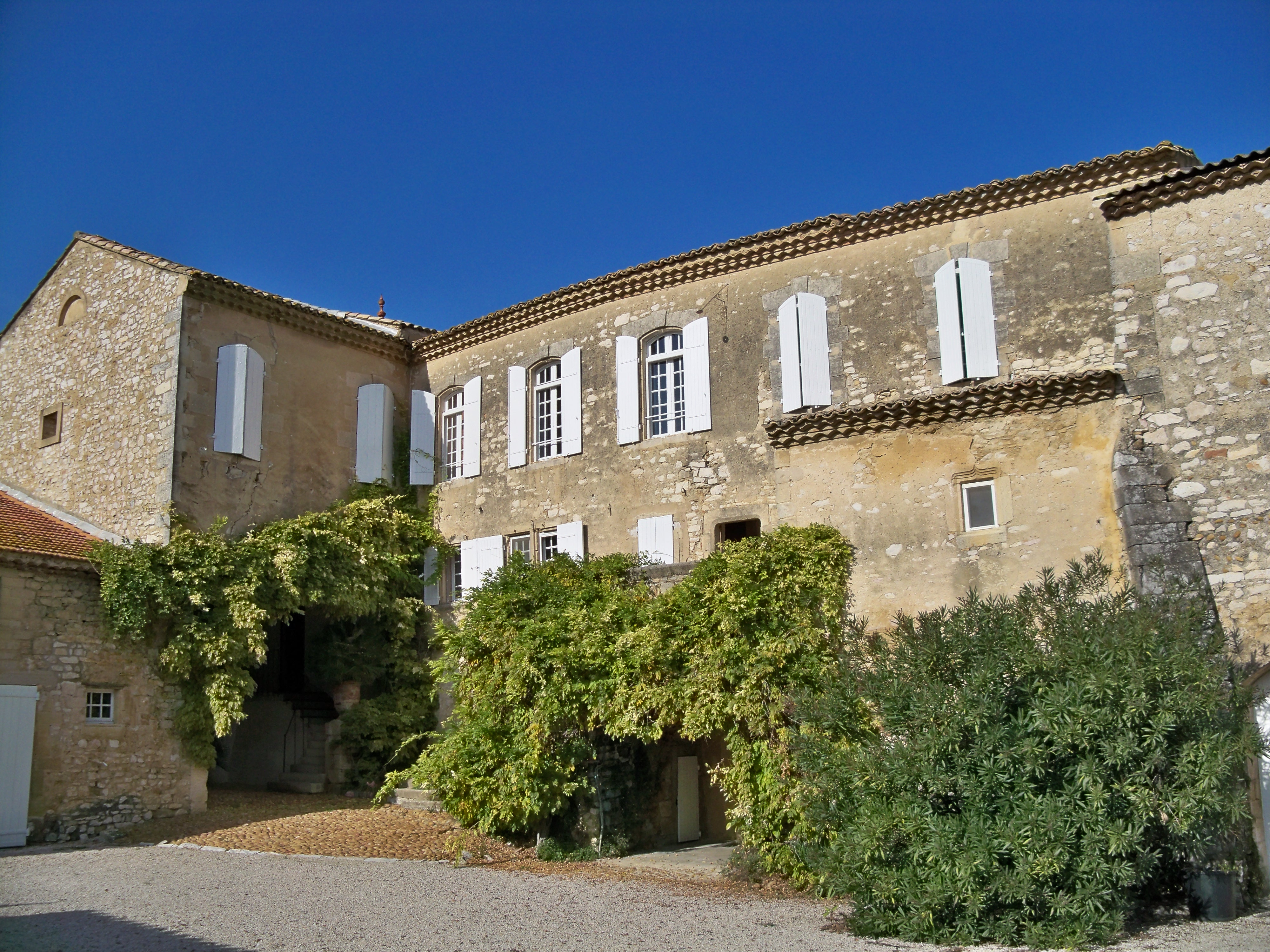 Prieuré de Montézargues, Tavel (30)